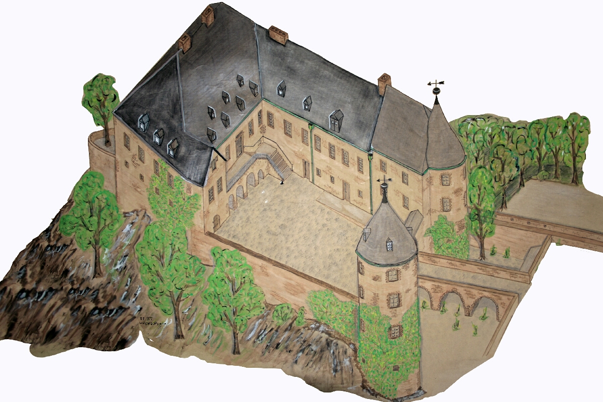 Rekonstruktion der Burg Bilstein vor der Erweiterung 1977 nach Bestandsplänen Staatshochbauamt Siegen